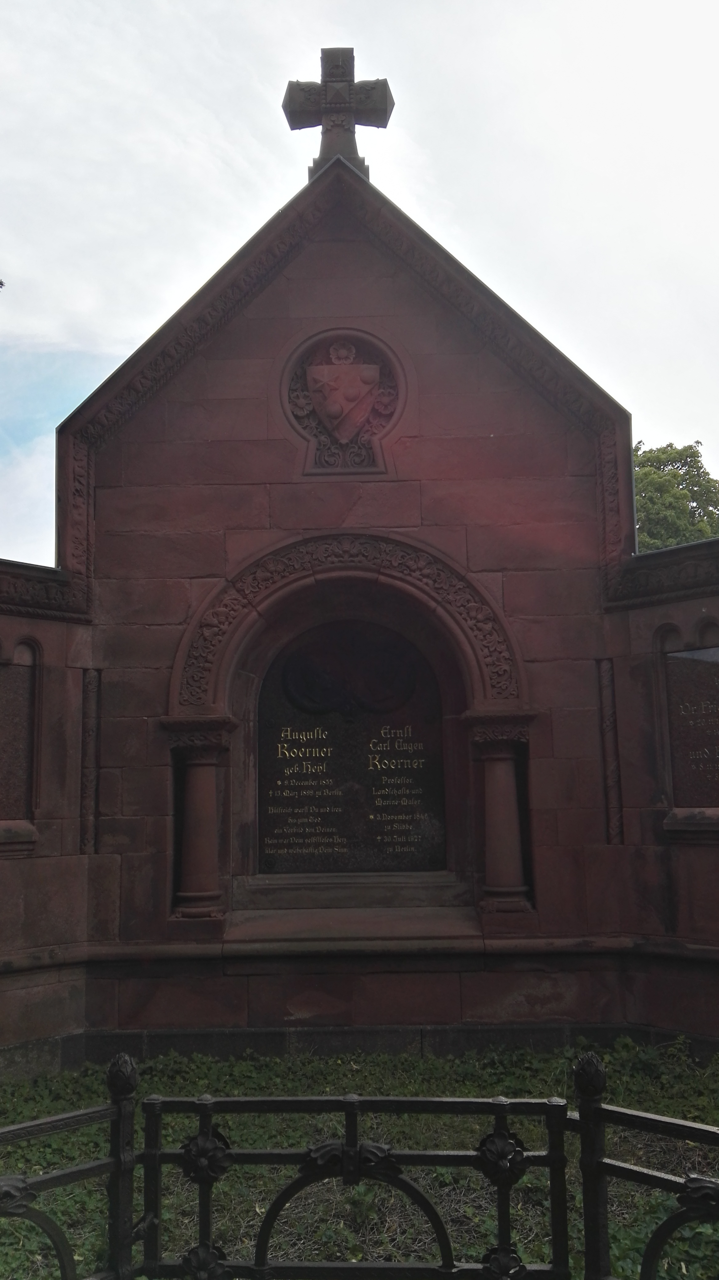 Grab von Ernst Koerner auf dem Luisenstädtischen Friedhof in Berlin